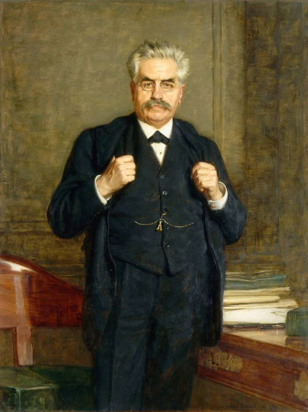 Alexandre Millerand, portrait présidentiel peint par Marcel-André Baschet.